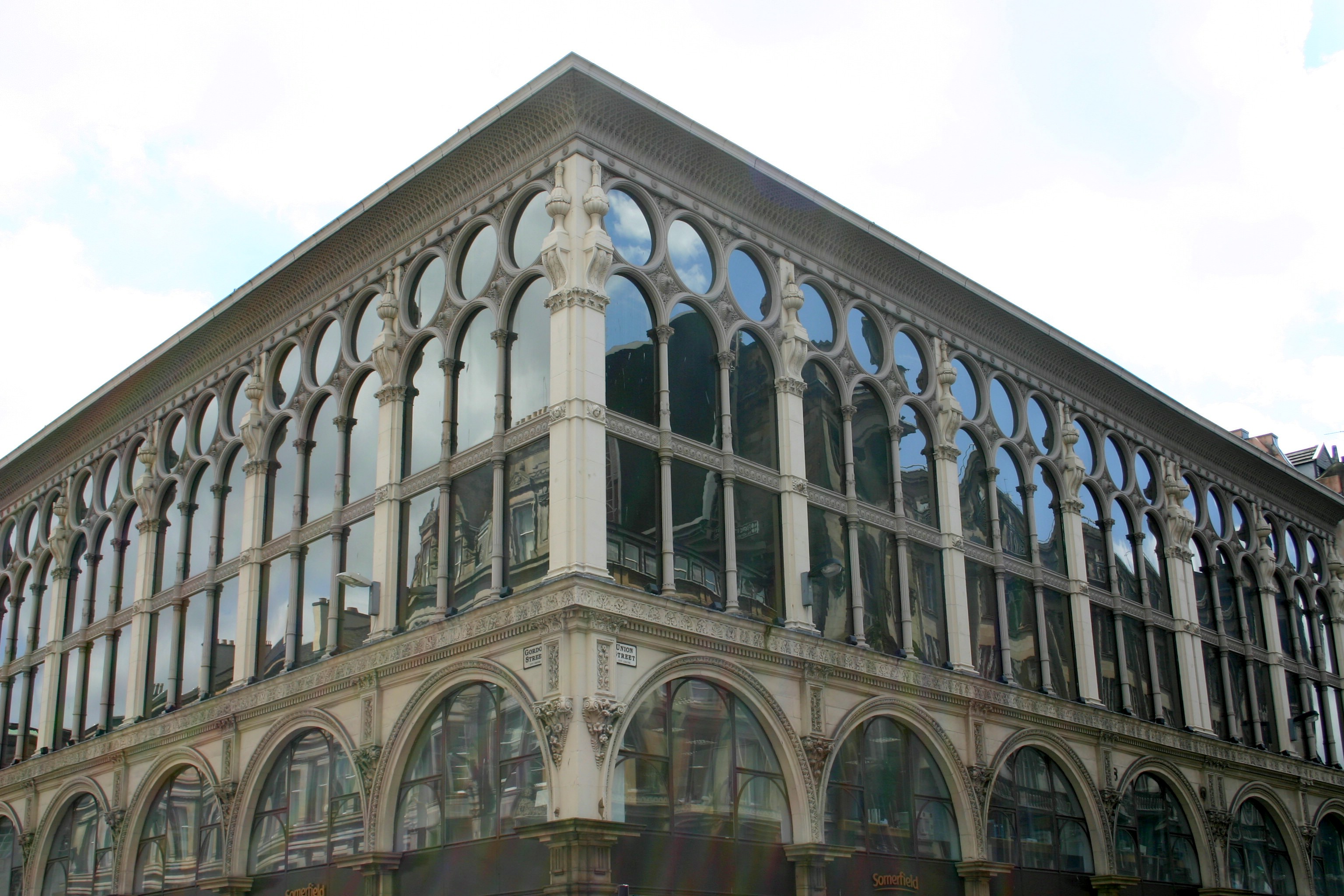 Ca D'Oro ēka.